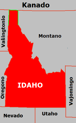 "Patotenilo" de Idaho